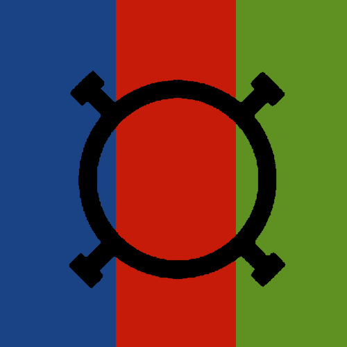 Hierro de la ganadería de lidia de Domingo Hernández.